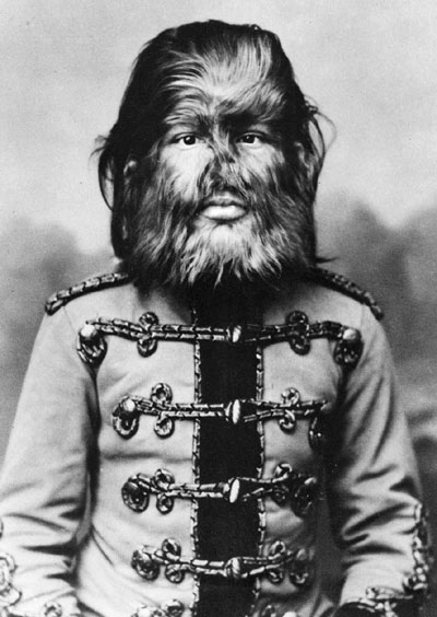 Фёдор Евтищев/Евтихиев, по прозвищу "Jo-Jo", известный как "человек с собачьей мордой"